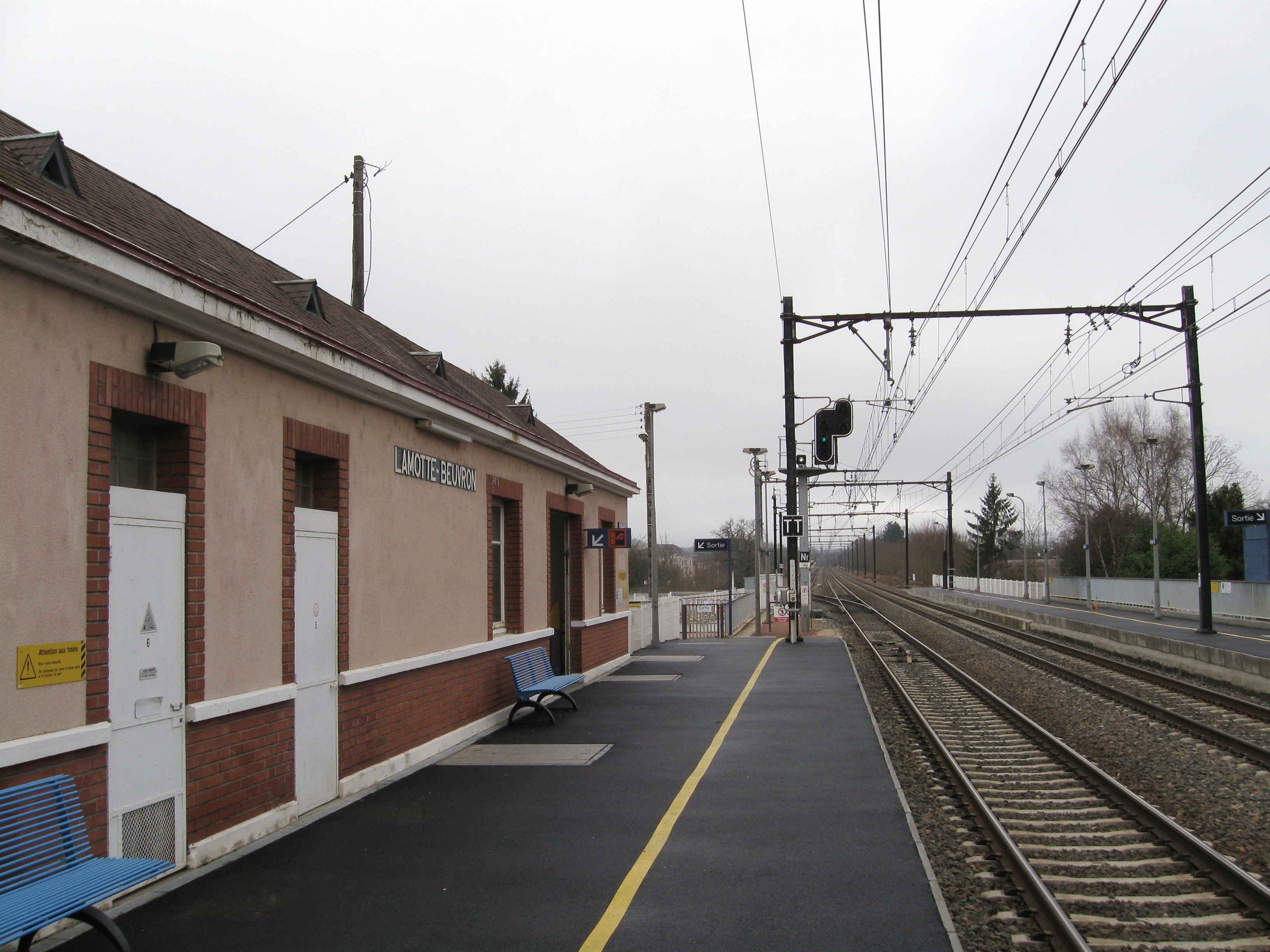 Quai et voies en direction d'Orléans, gare de Lamotte-Beuvron, Loir-et-Cher, France